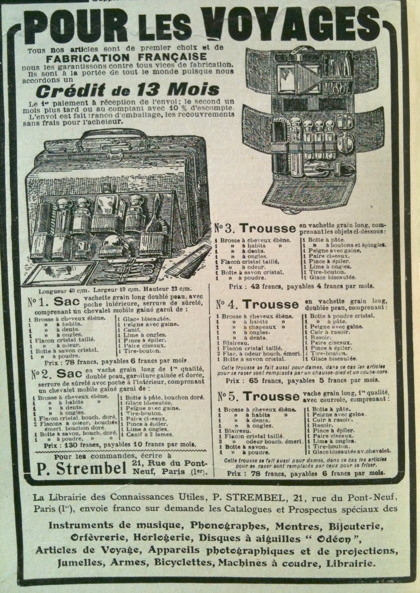 Publicité pour trousse ou kit de voyage P. Strempel, Paris, paru dans Je sais tout nov. 1909.